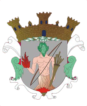 Stemma Mezquitic